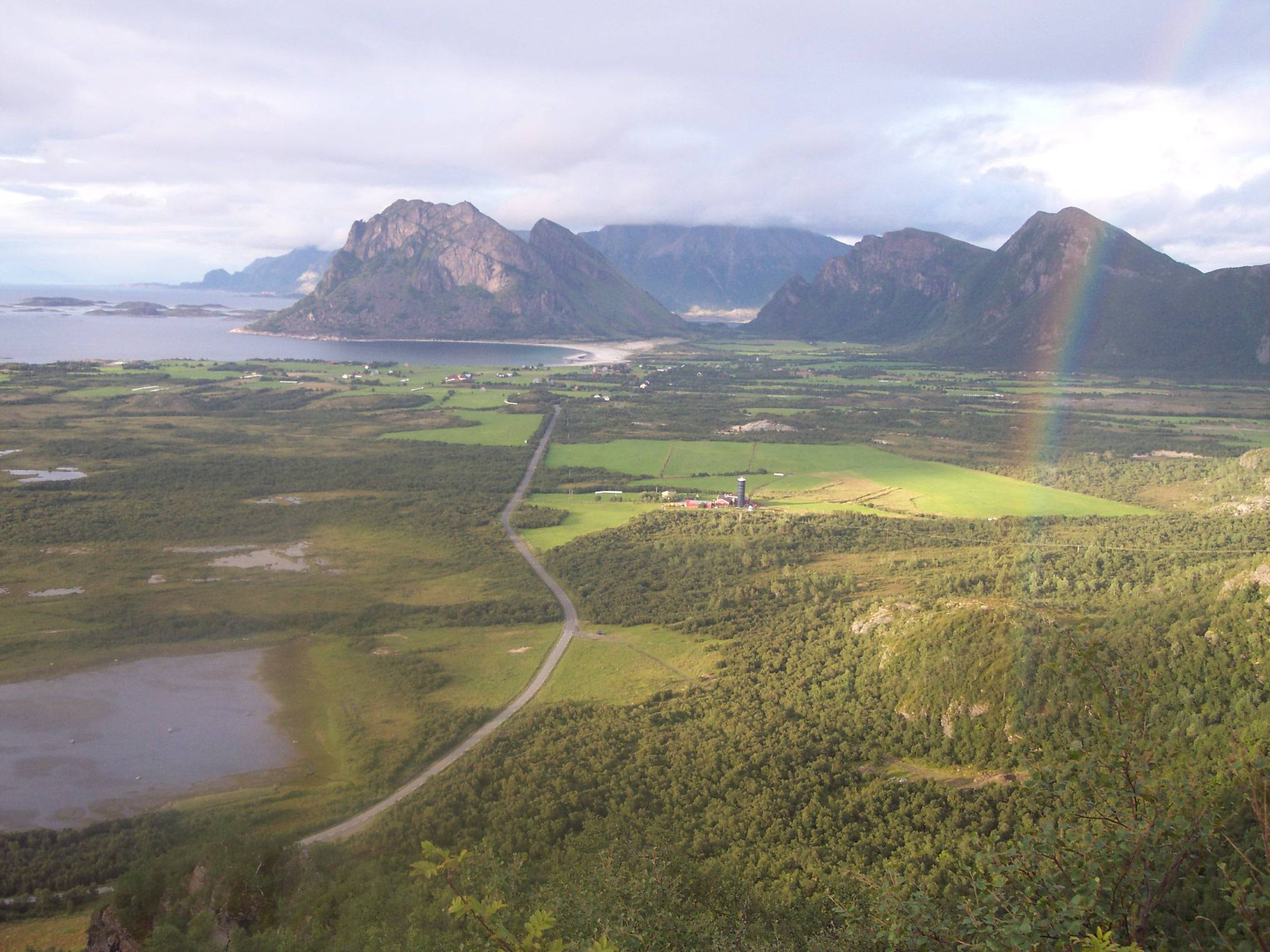 Engeløya i steigen, på baksida. Bilde tatt av Thor-Rune Hansen.